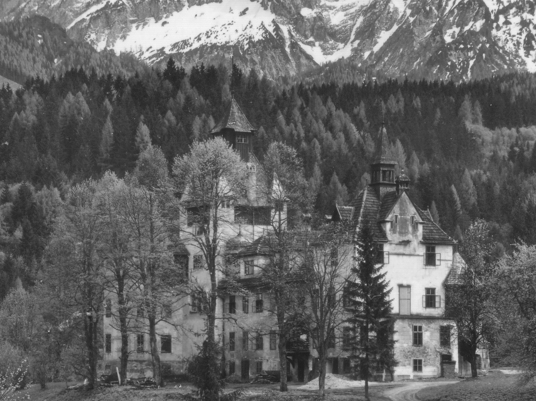 Schloss Kassegg in den frühen 1950er Jahren